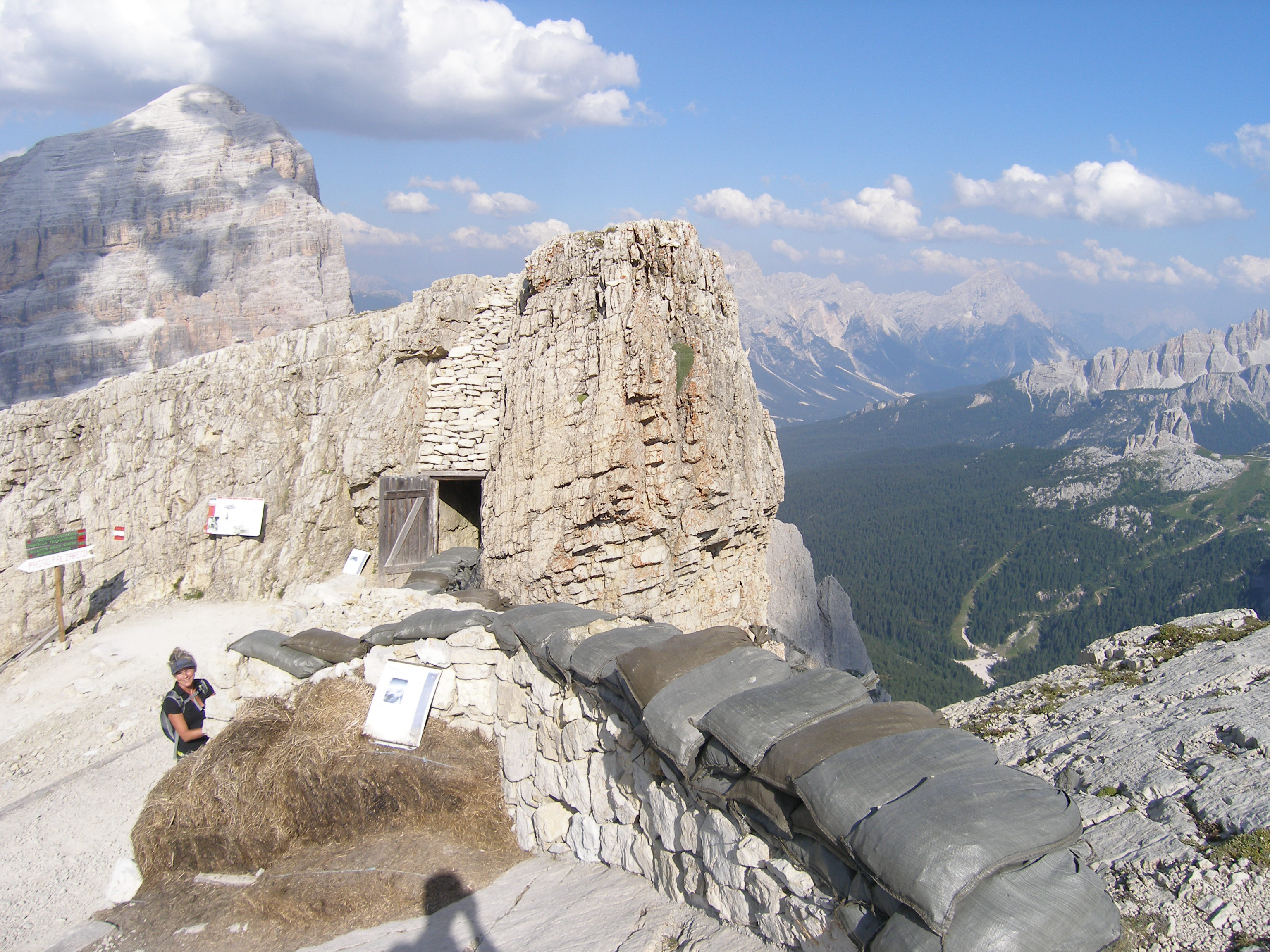 Falzarego ww1 bunker